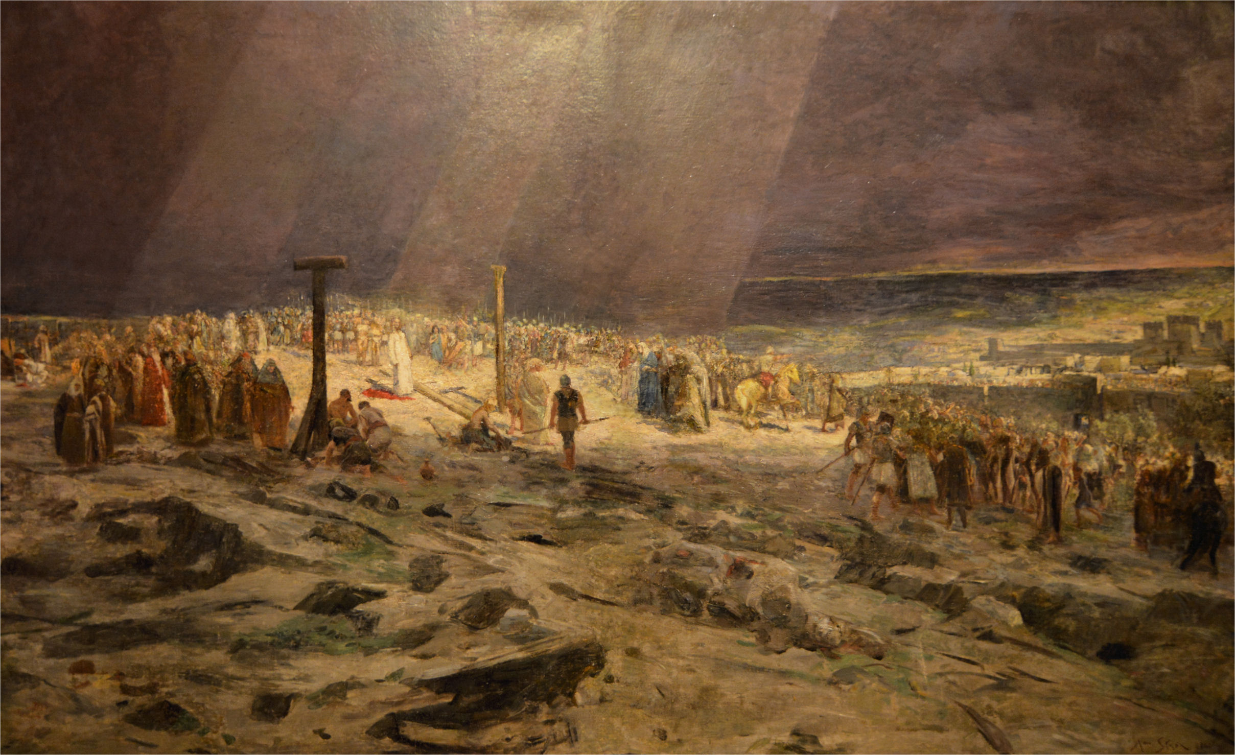 Obraz Jana Styki z ok. 1896 r. "Golgota" będący szkicem panoramy o tej samej nazwie. Obraz zakupiony został w 2013 r. przez Muzeum Narodowe w Szczecinie